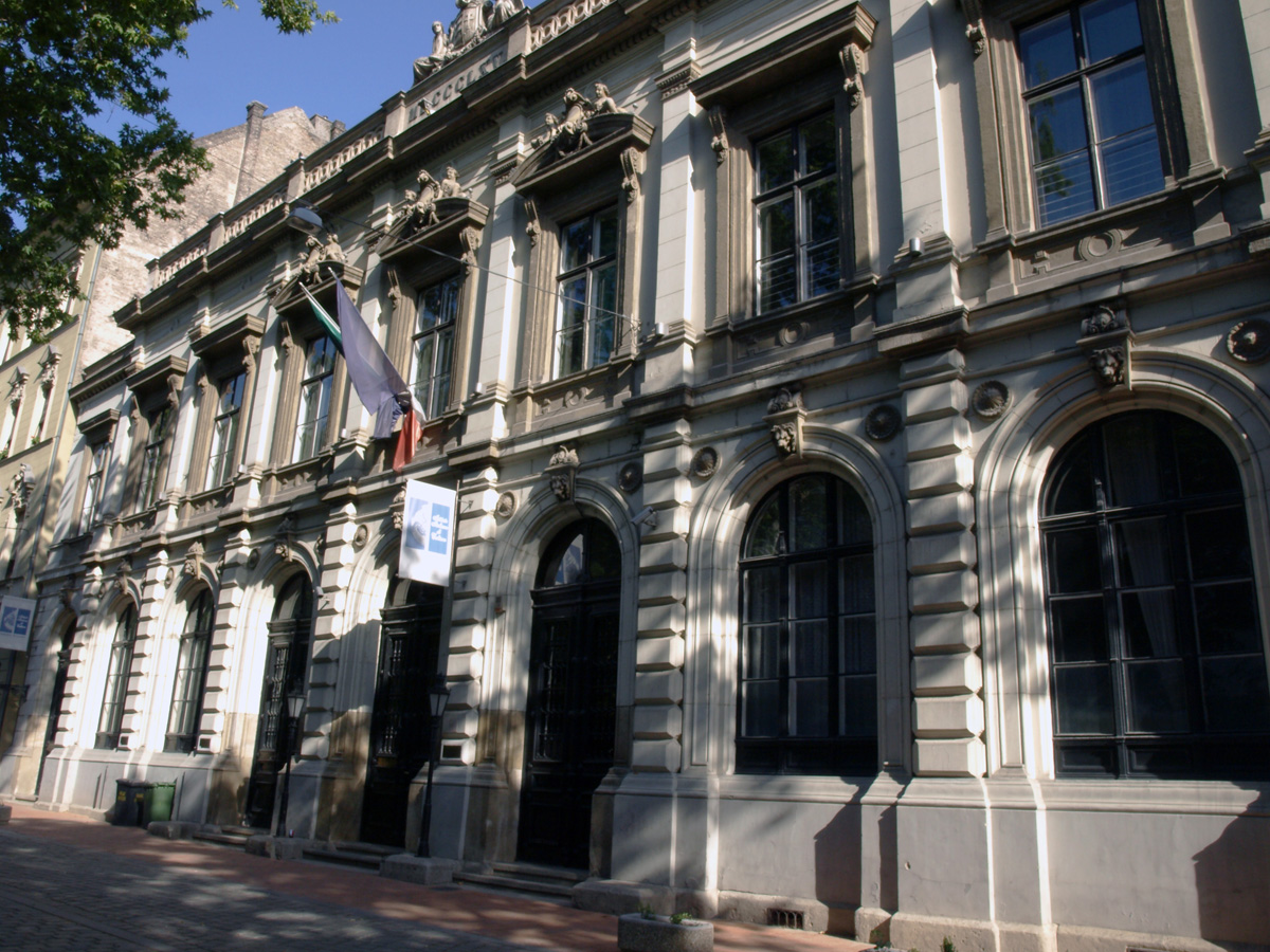 Budapesti Olasz Kultúrintézet, V. kerület, Bródy Sándor utca 8.